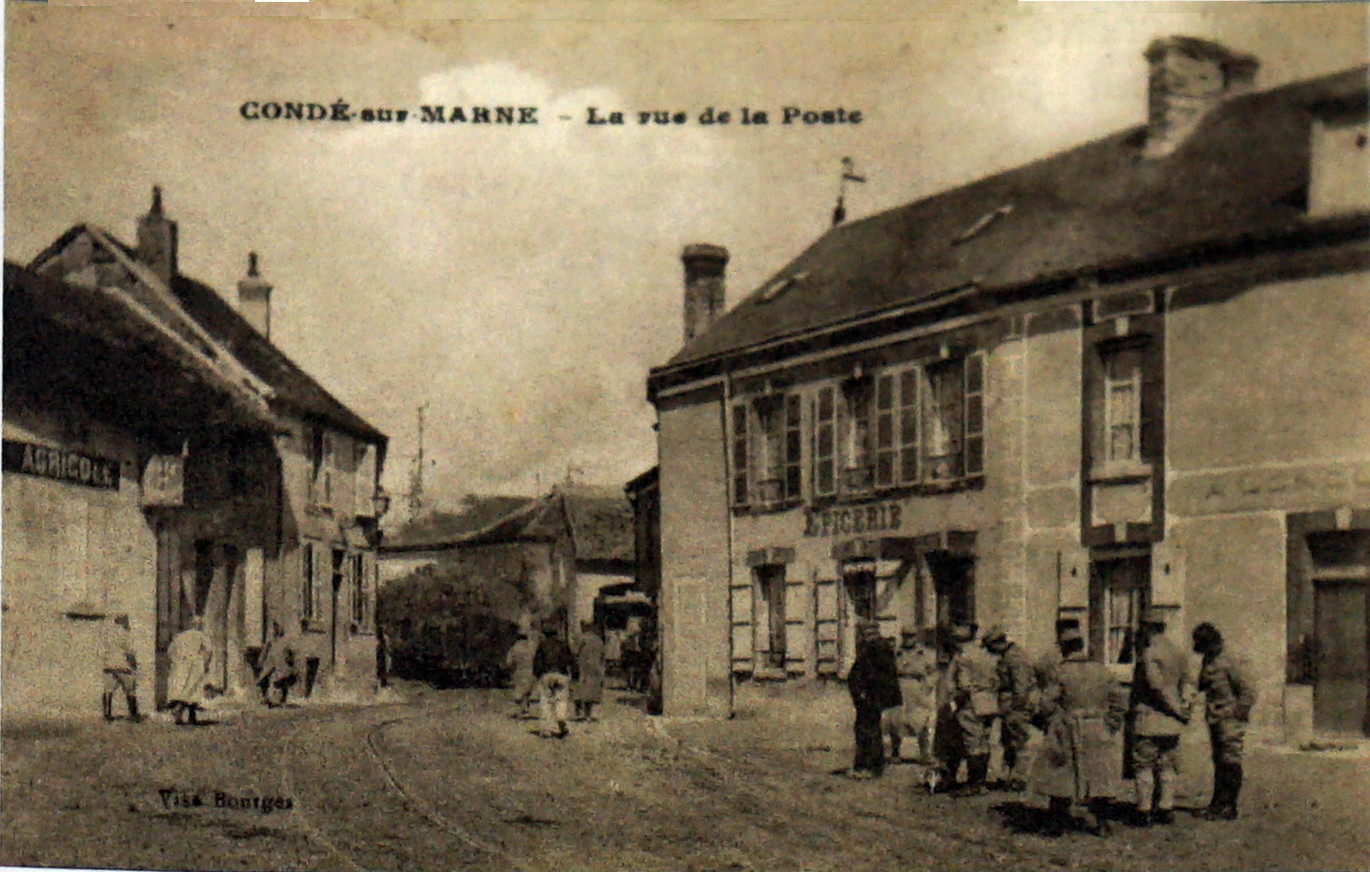 sur une vue ancienne.